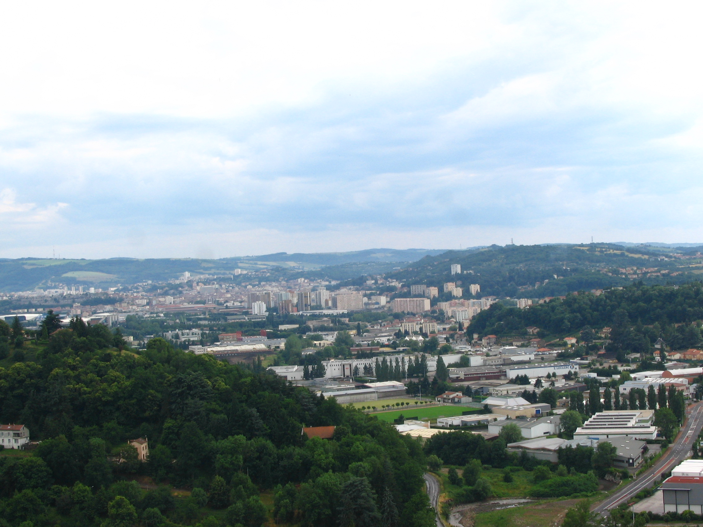 St-Etienne (Loire) depuis La Tour en Jarez; derrière la ZA de la Bargette et le centre commercial, les quartiers nord de la préfecture du département: immeubles place J. Massenet (La Terrasse) et rue Bergson. On devine tout à gauche, derrière le massif boisé, les toitures des Zénith et stade G. Guichard.